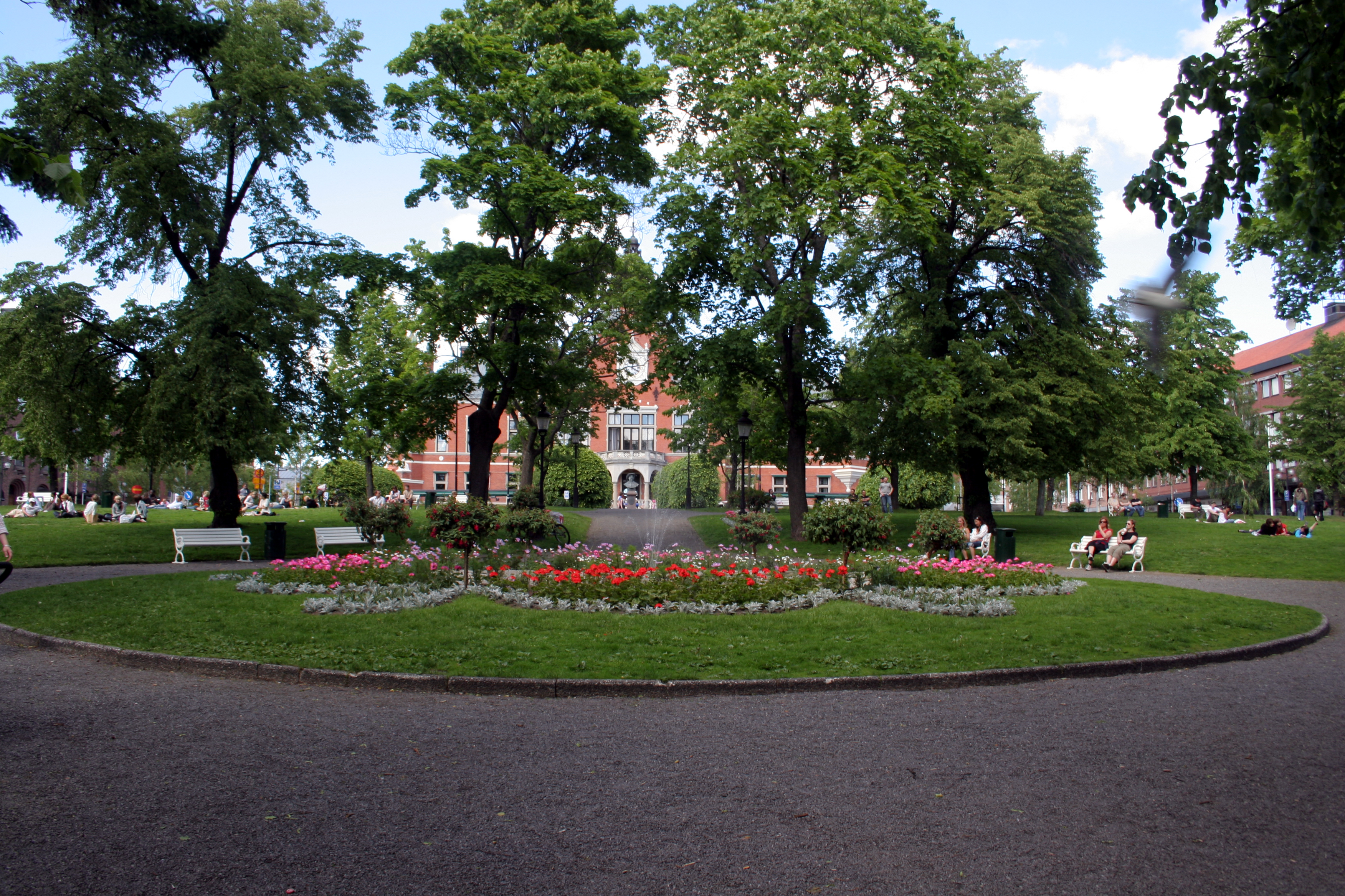 Rådhusparken, Umeå, Sweden.